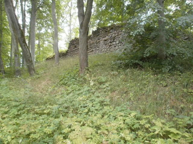 Linnusemüüri ida - kagupoolne väliskülg.